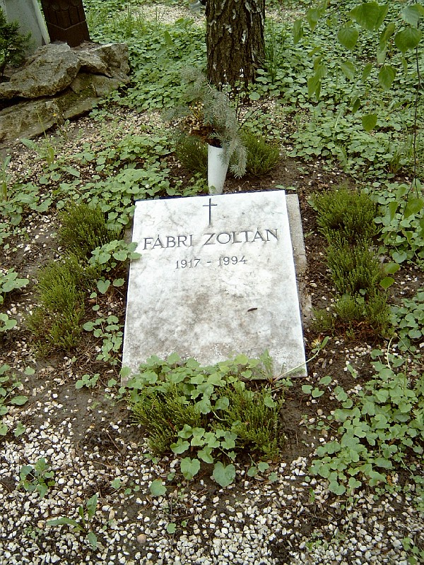 Fábri Zoltán sírja Budapesten. Farkasréti temető: 32/2-1-159/G.